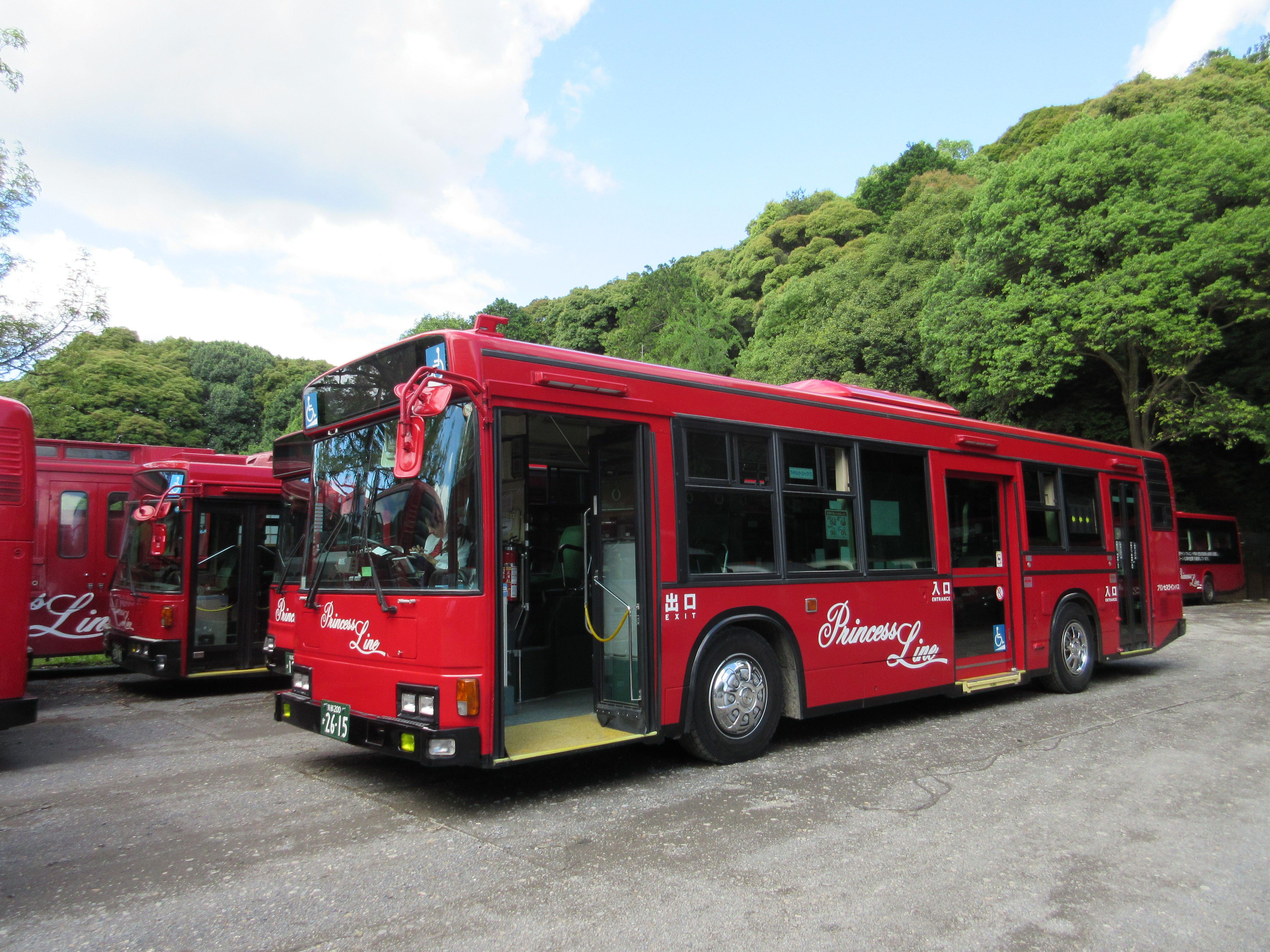 京都急行バスです。